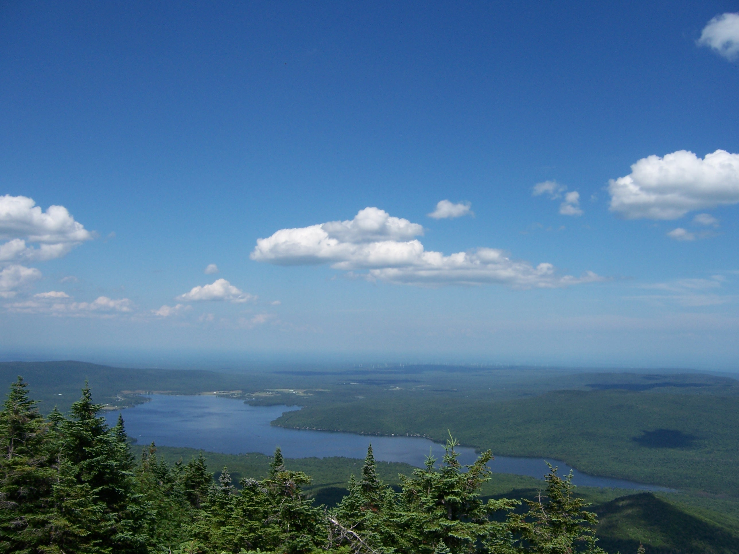 View of Chazy Lake from the Top of Lyon Mountain